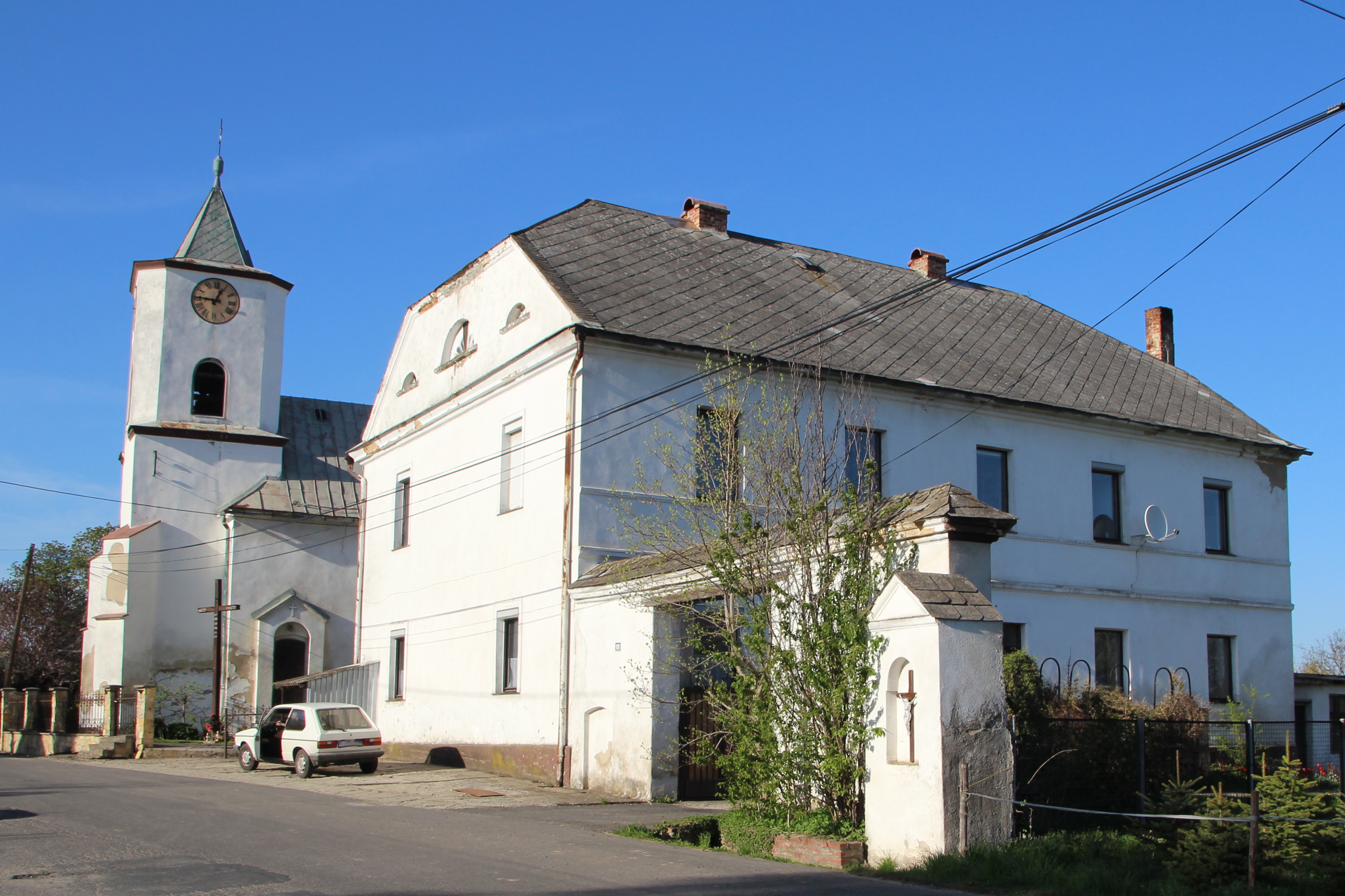 Braciszów - plebania z XIX w. i kościół pw. św. Jana Nepomucena z drugiej poł. XVIII w.